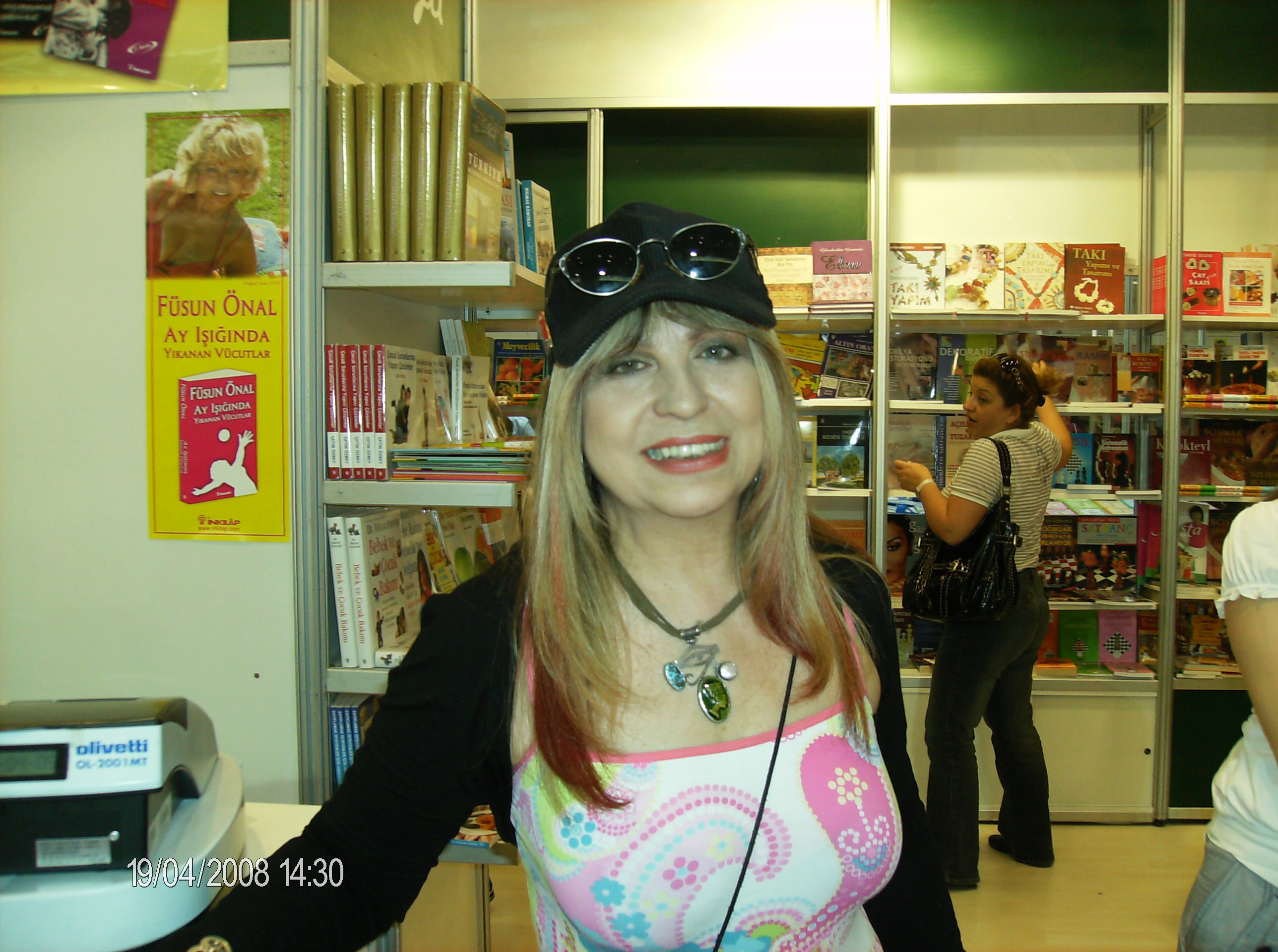 kendi çekimim (13. İzmir kitap fuarı)